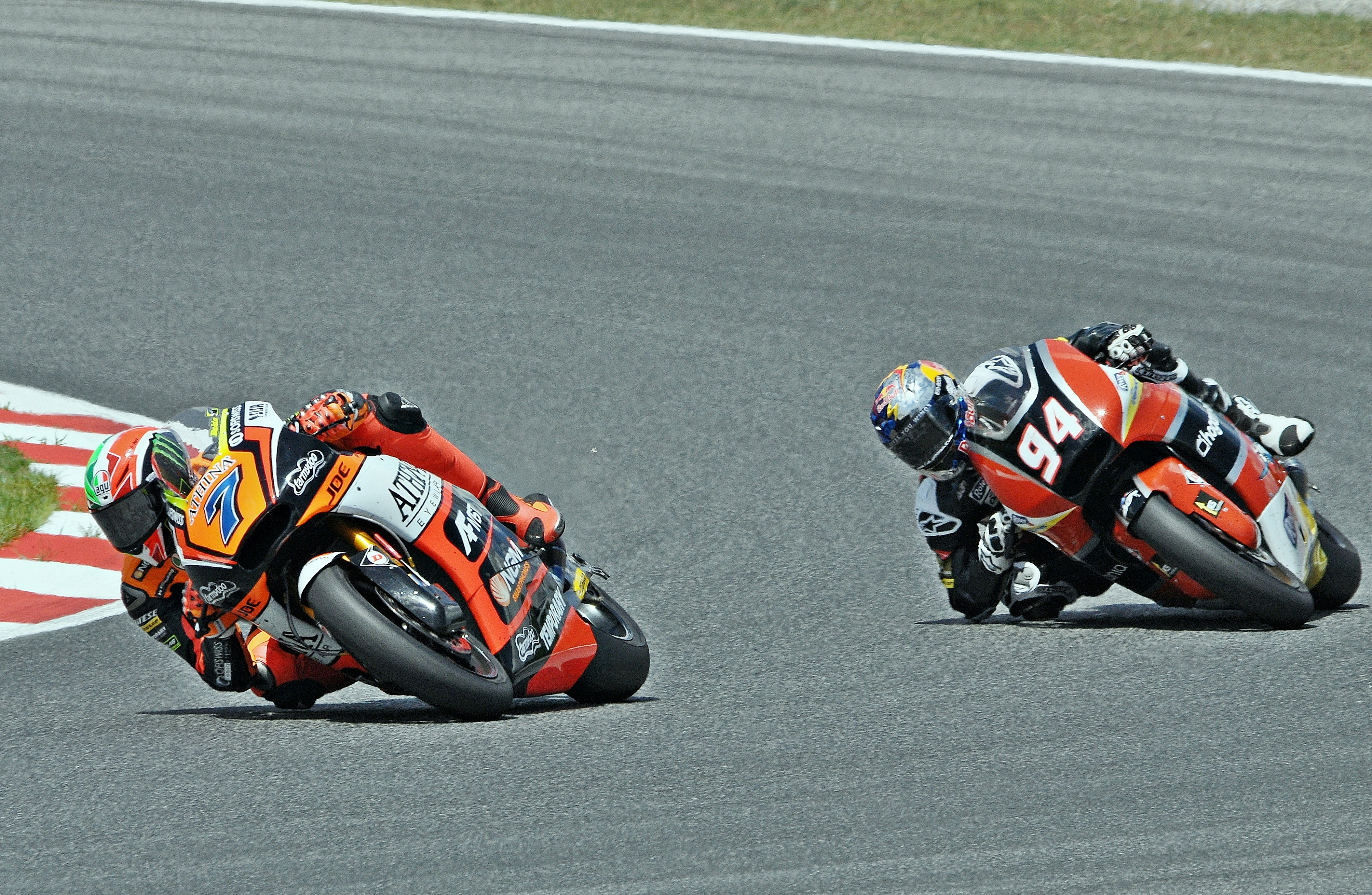 gran premio de cataluña